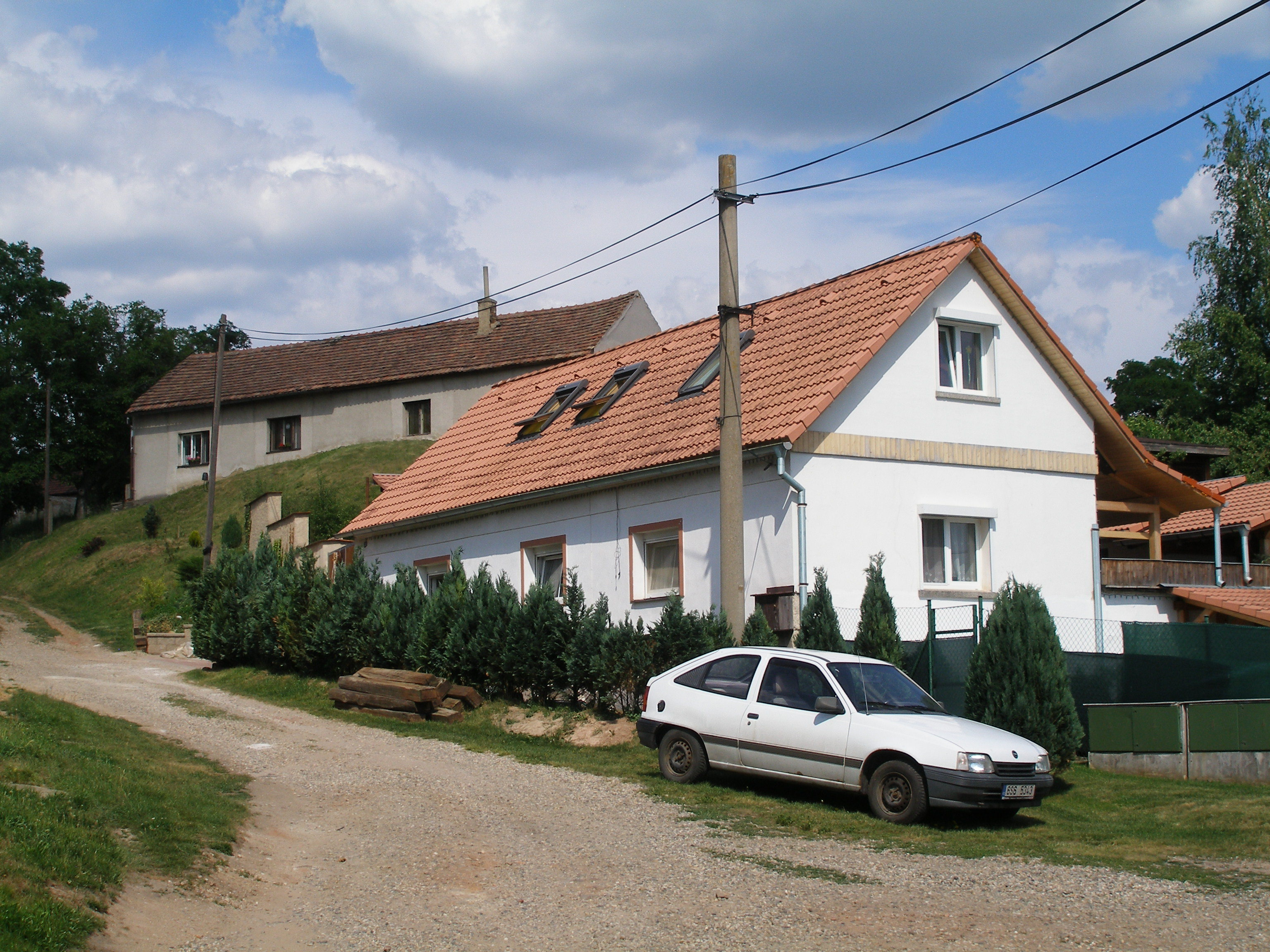 Domy v Břešťanech.